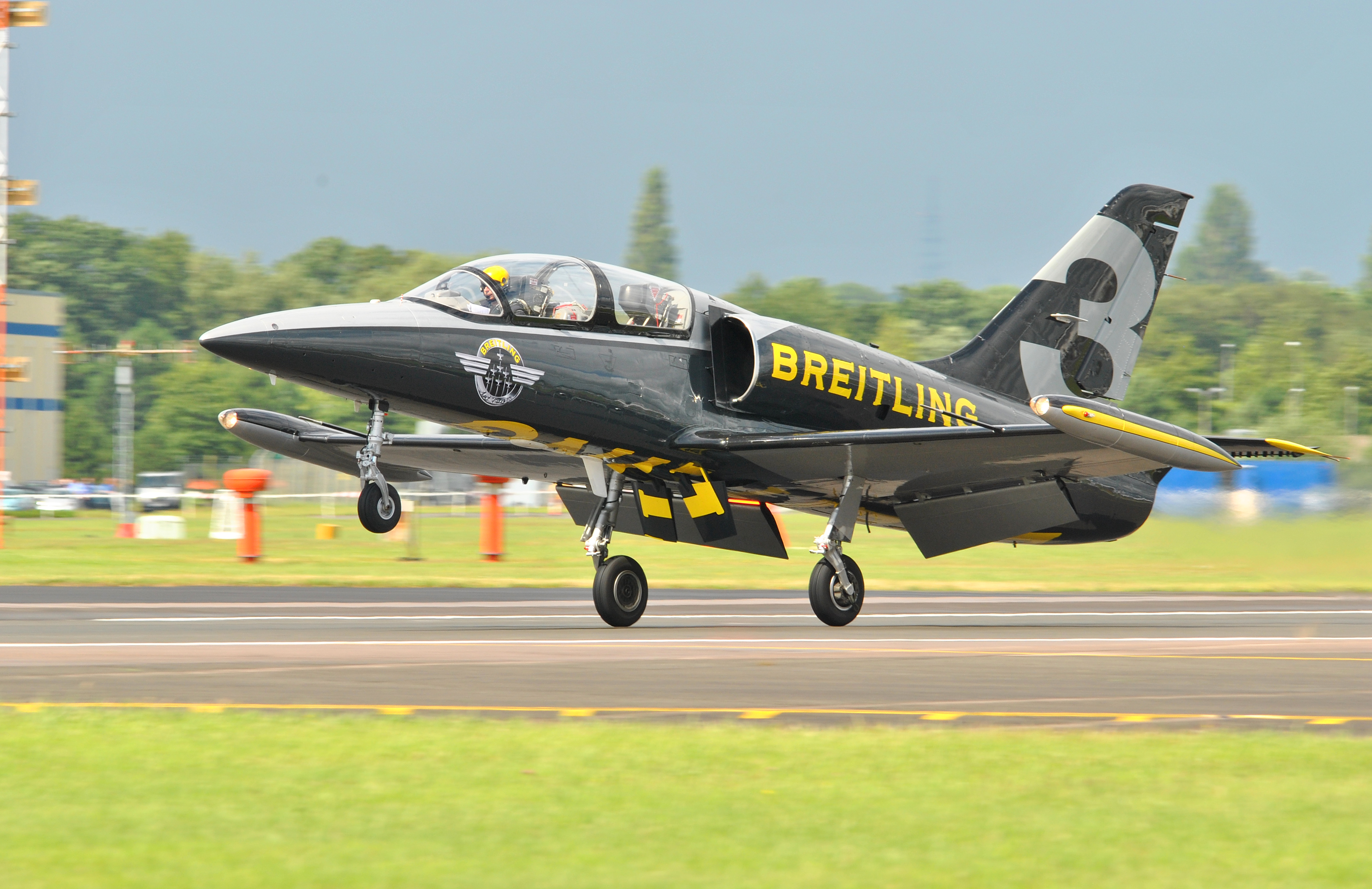 Breitling Jet Display Team